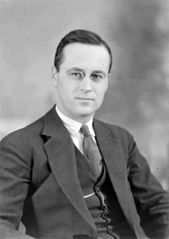 Rodolphe Rubattel, späterer Bundesrat